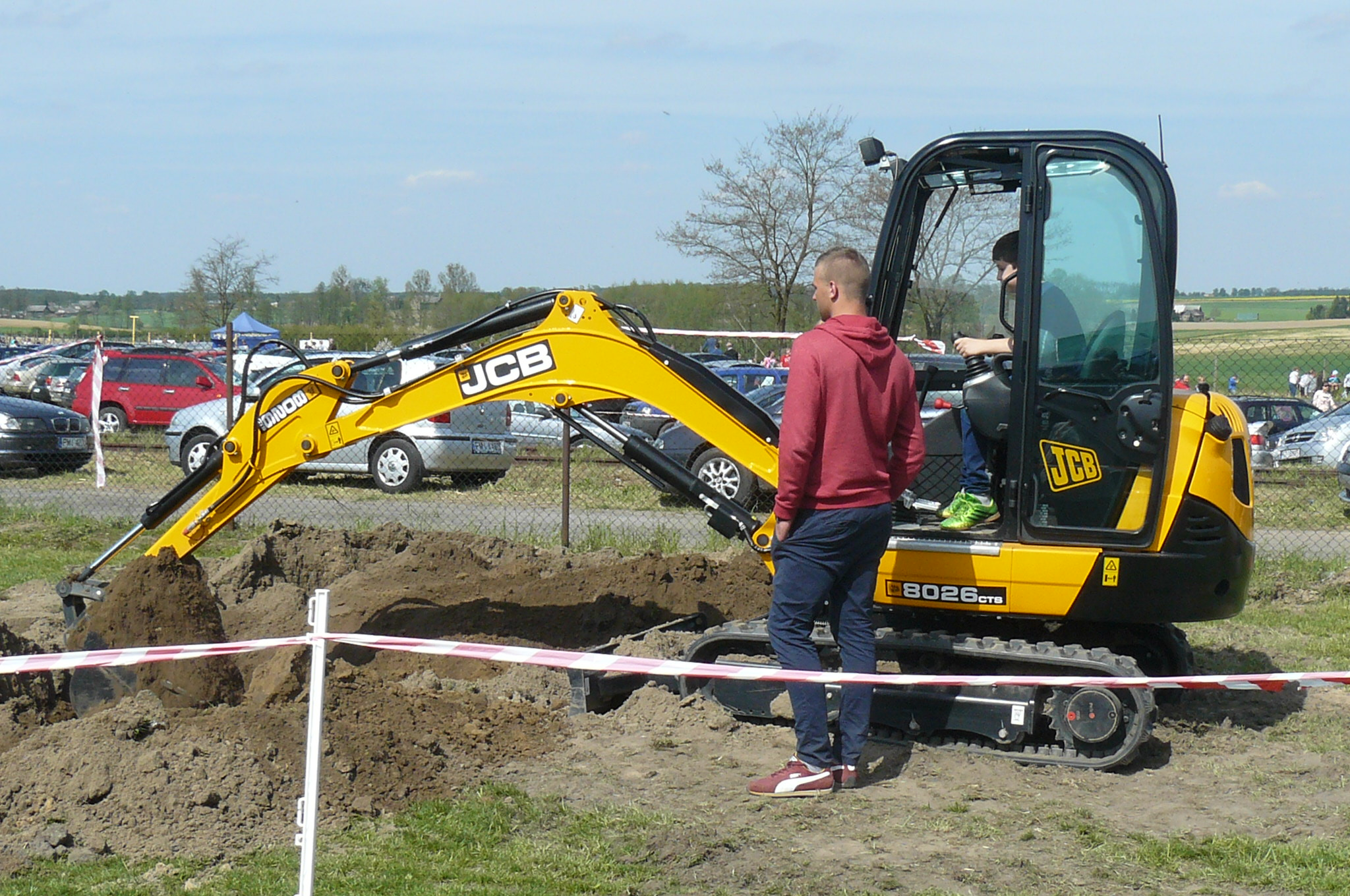 Międzynarodowe Targi Tulipanów 2015 - Chrzypsko Wielkie, 1-3.5.2015r.